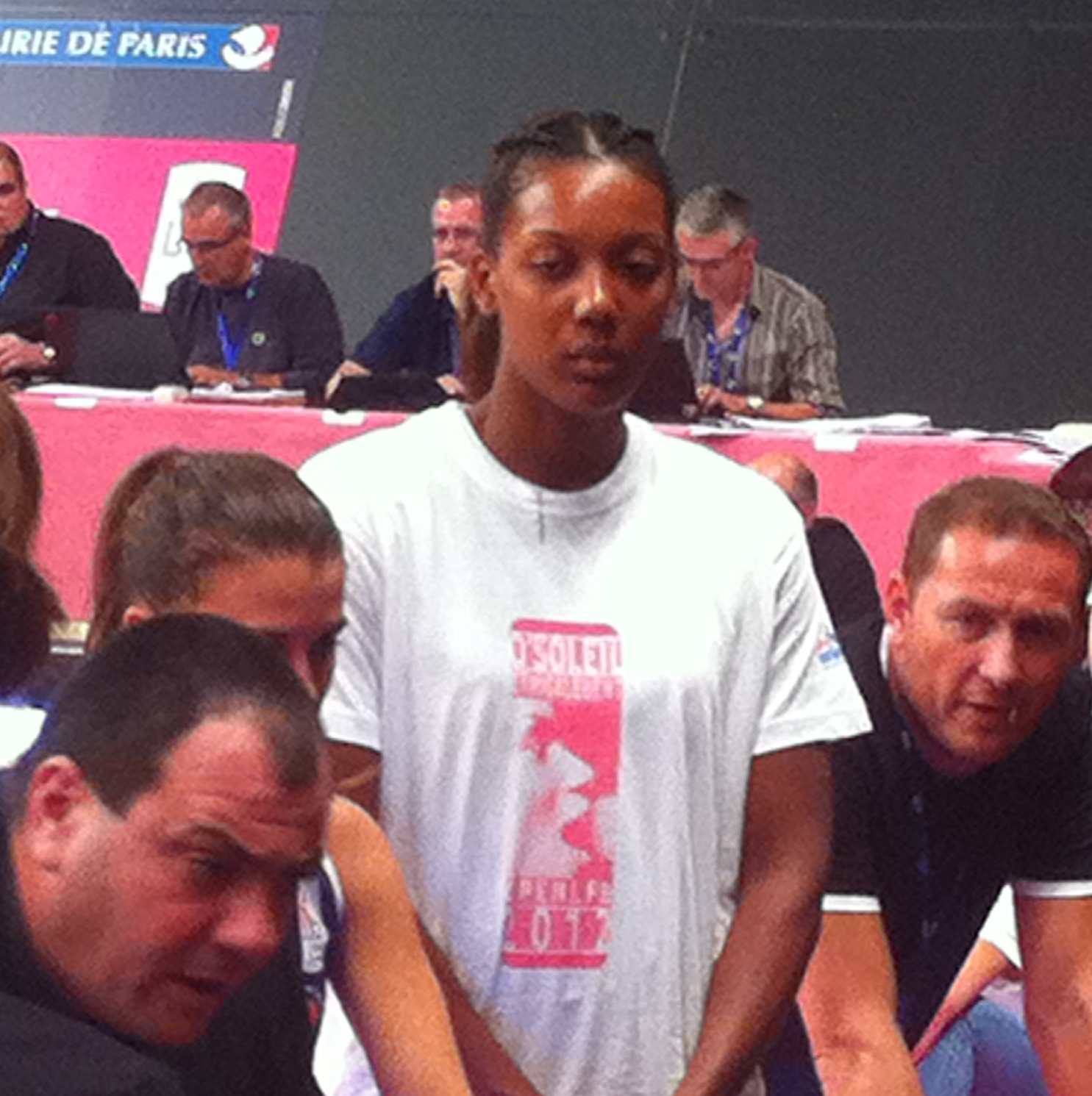 La basketteuse américaine Angelica Robinson, avec le club de Tarbes, lors d'un temps mort à l'Open LFB 2012 à Paris.